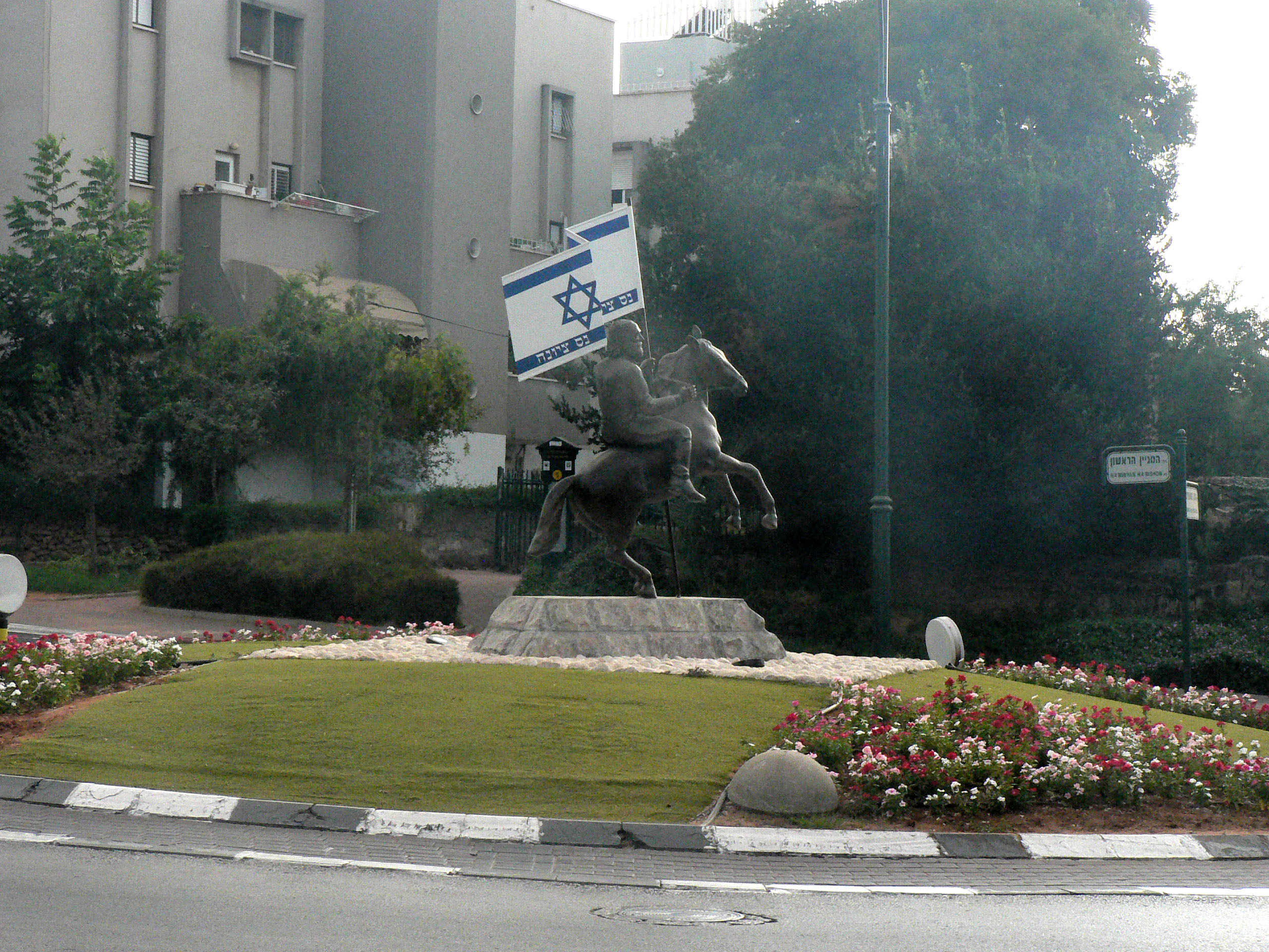 Ness Ziona נס ציונה